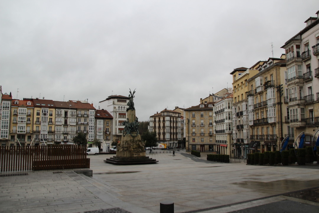 Gasteizko Aleak egindako argazki sorta, COVID-19aren eraginez hartutako neurriena. Argazki guztiak ikusgai helbidean.